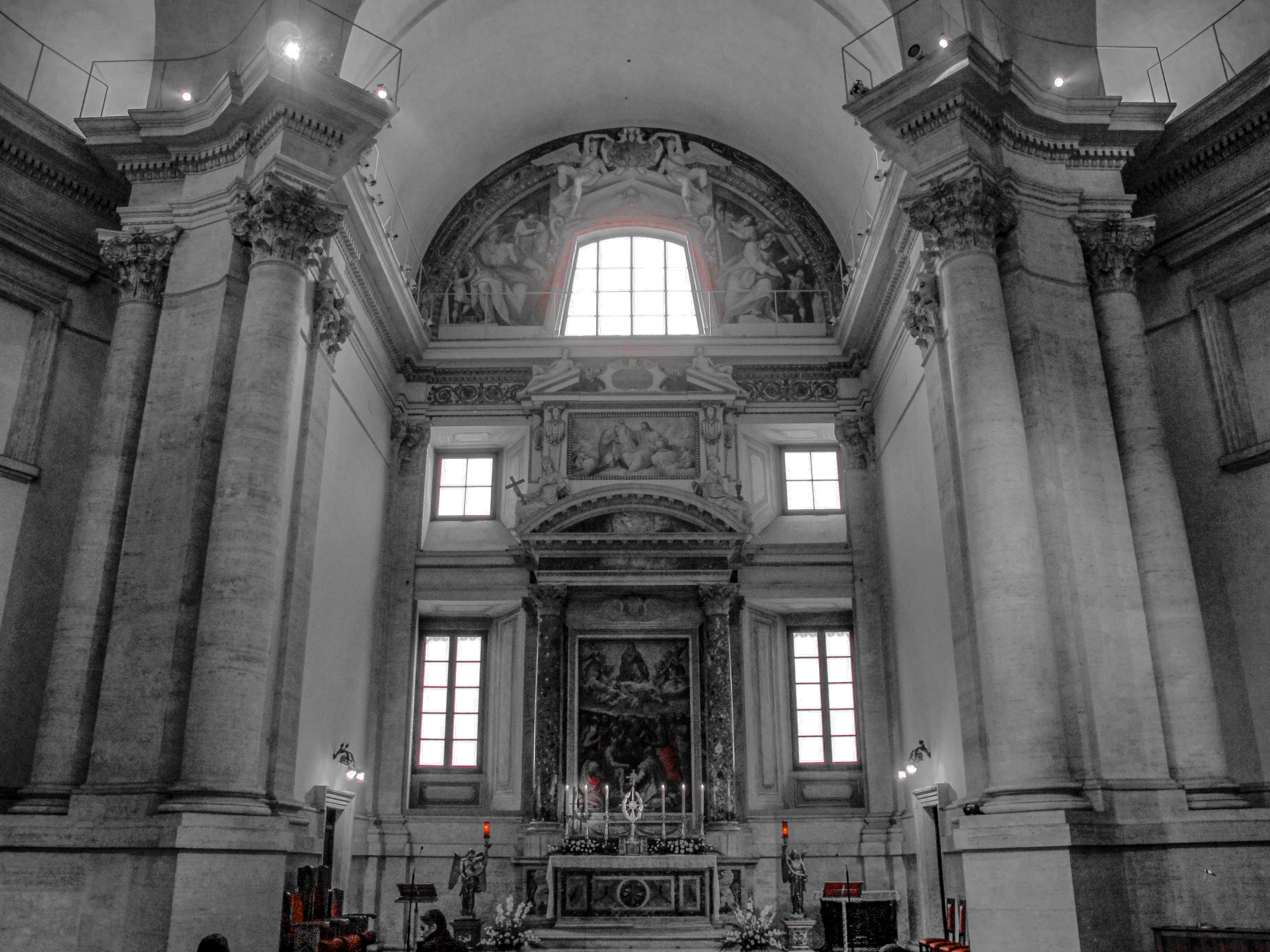 Santa Maria Maggiore (Roma)